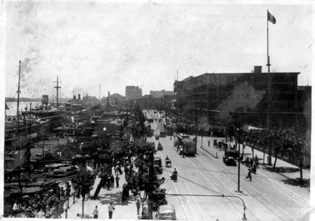 上海法兰西外滩